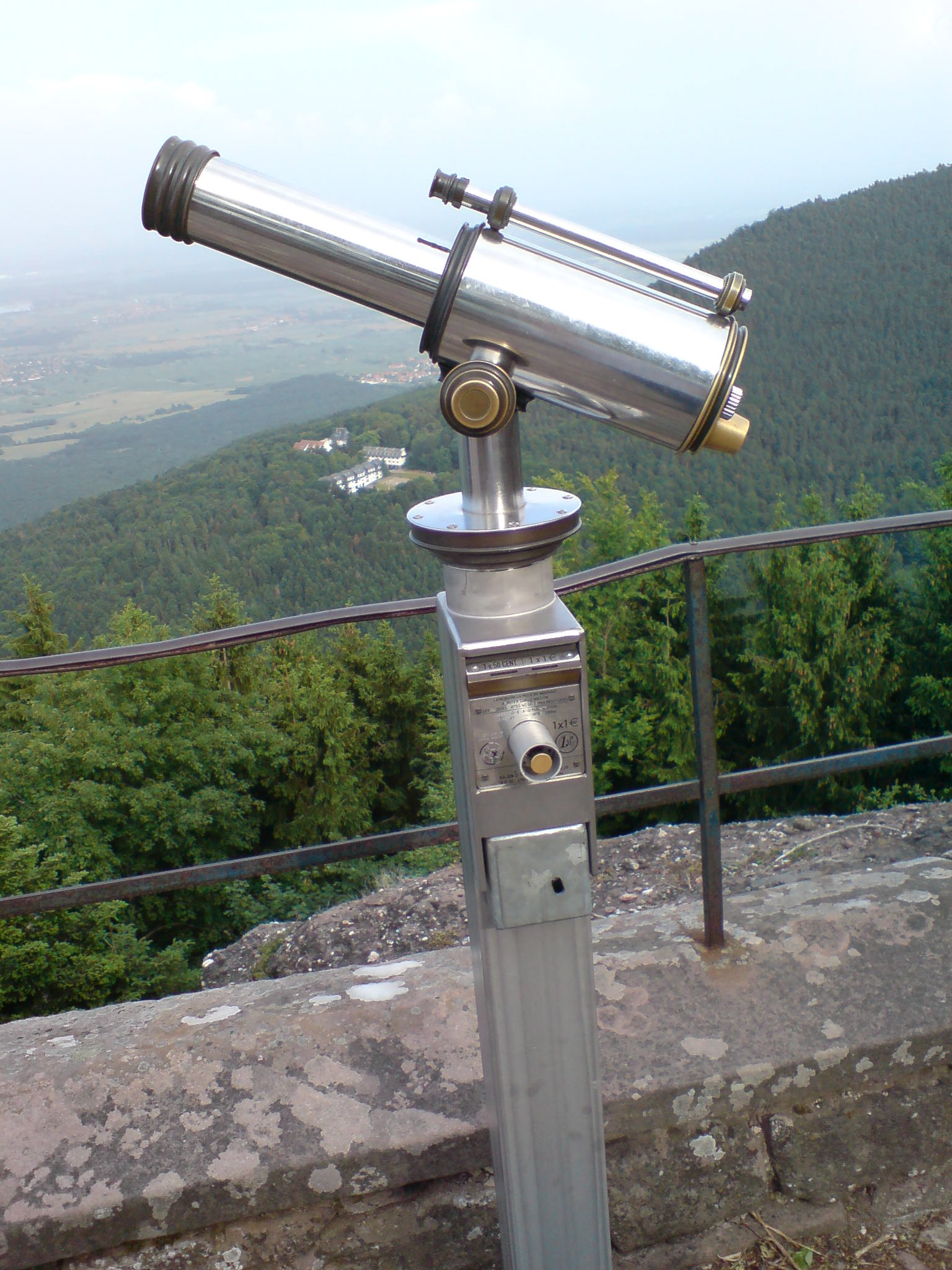 טלסקופ אופטי אוסף ומרכז אור בעיקר מהתחום הנראה של הספקטרום האלקטרומגנטי, ישנם טלסקופים שעובדים בתחום התת אדום והעל סגול.